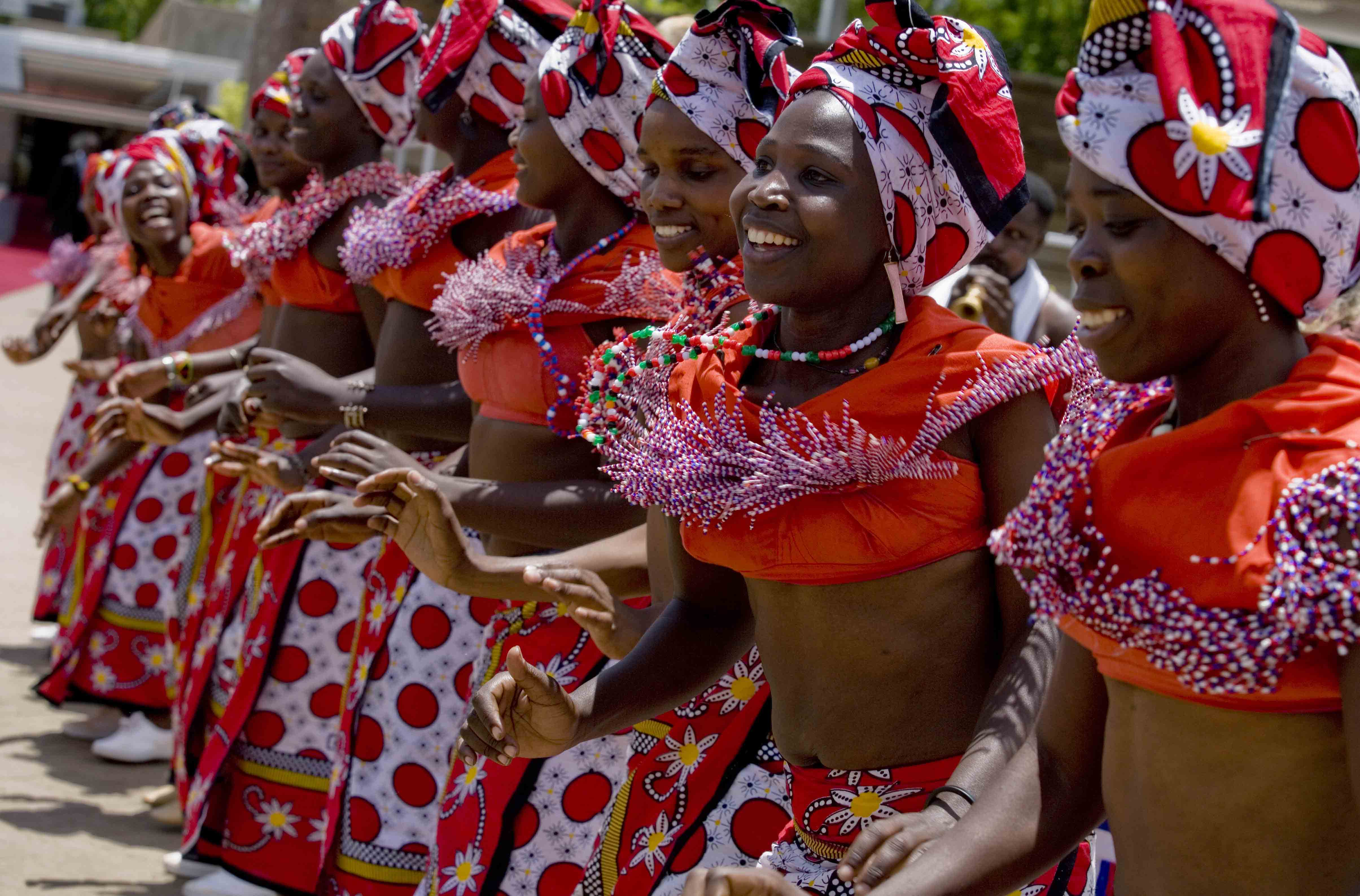 Traditional dancers perform in Nairobi, Kenya.